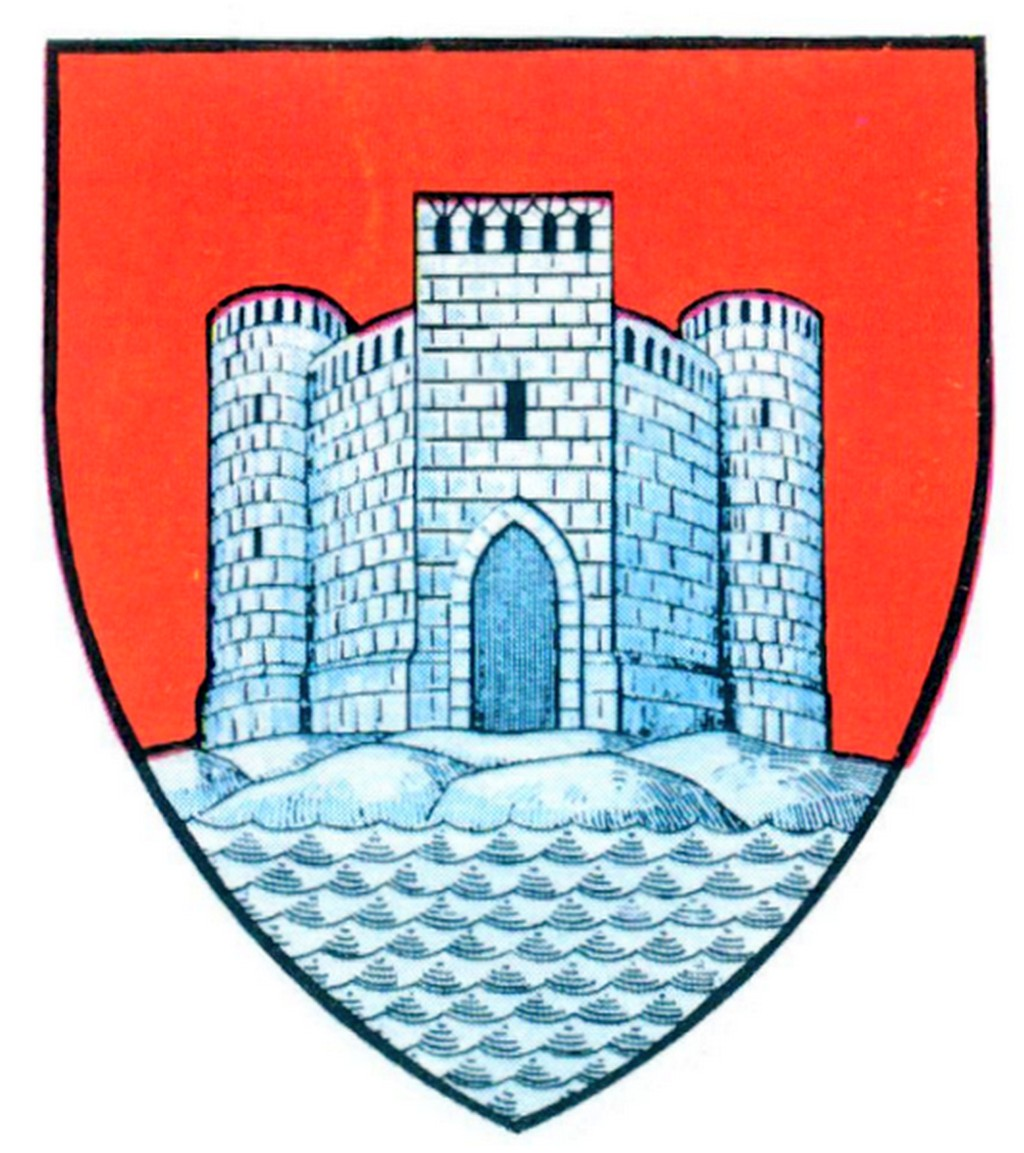 Stema orașului Soroca, Republica Moldova